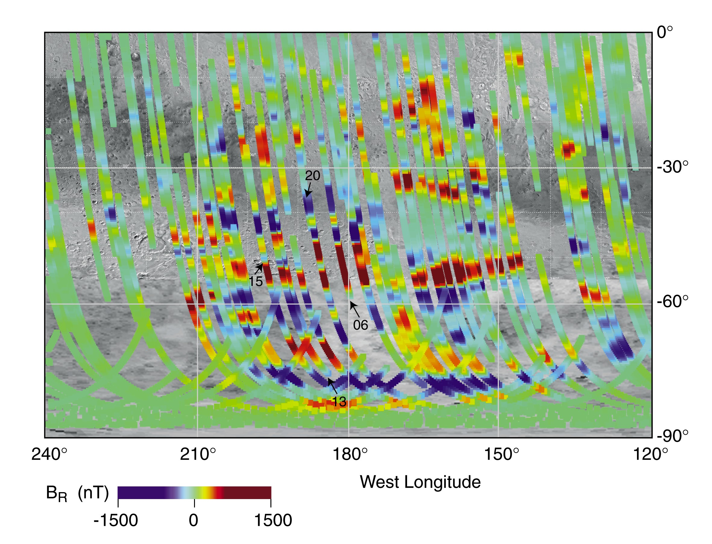 de: Magnetisierung des Mars (rot und blau kennzeichnen entgegengesetzte Richtungen des Magnetfelds) en: Magnetism on Mars fr: Relevé (partiel) du magnétisme sur Mars (planète)